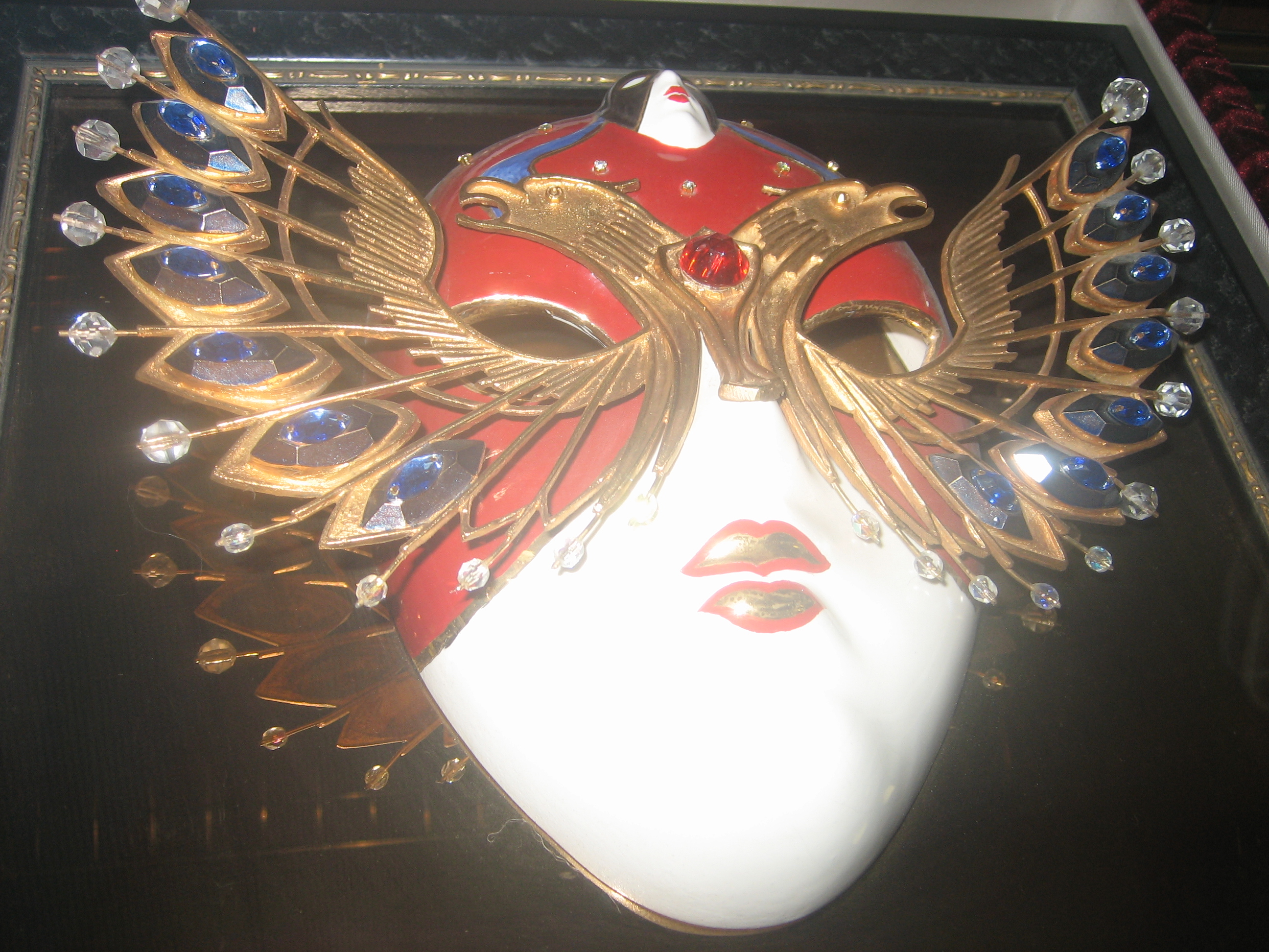 Лучший спектакль: «Сказка о царе Ироде, или Вертепщик», театр «Арлекин», Омск, 1998 год